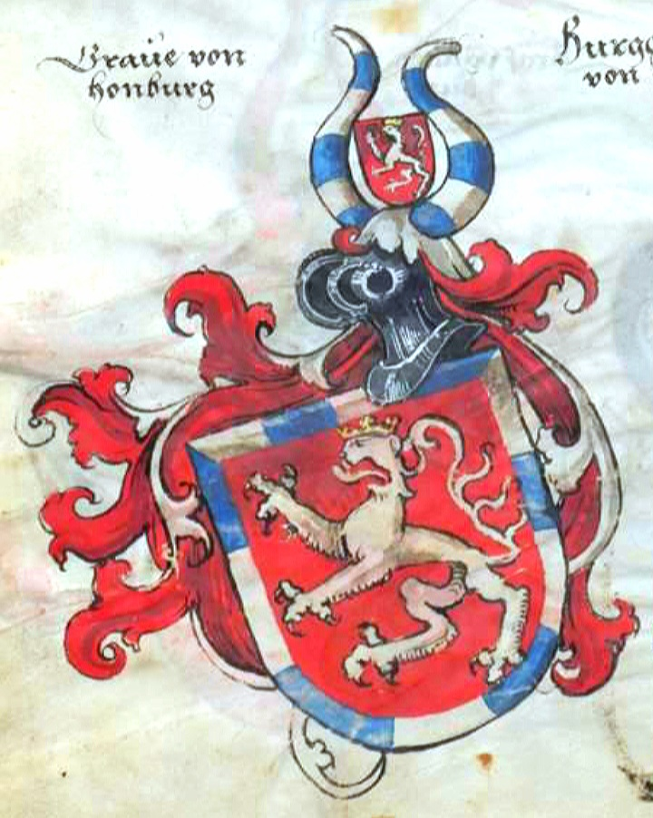 Wappen derer Edelherren ("Grafen") von Homburg.